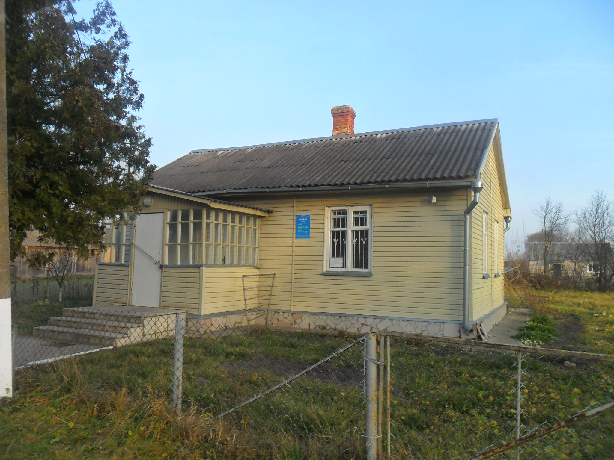 Аптека